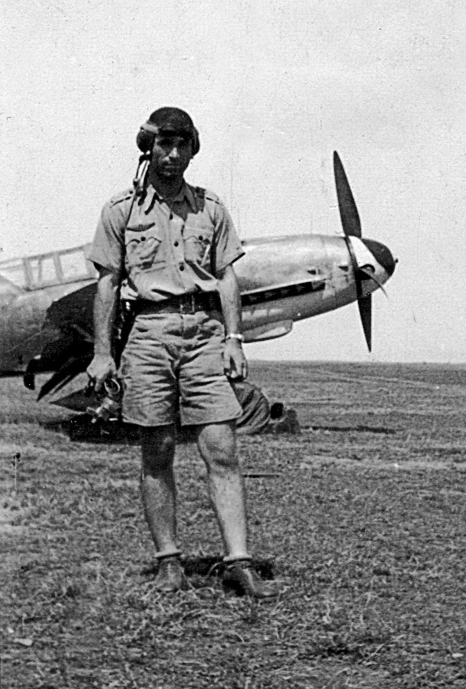 Петър Манолев през лятото на 1944 г